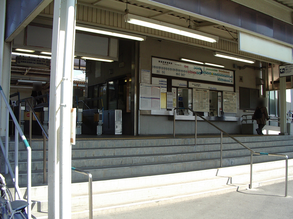 京成電鉄本線京成西船駅